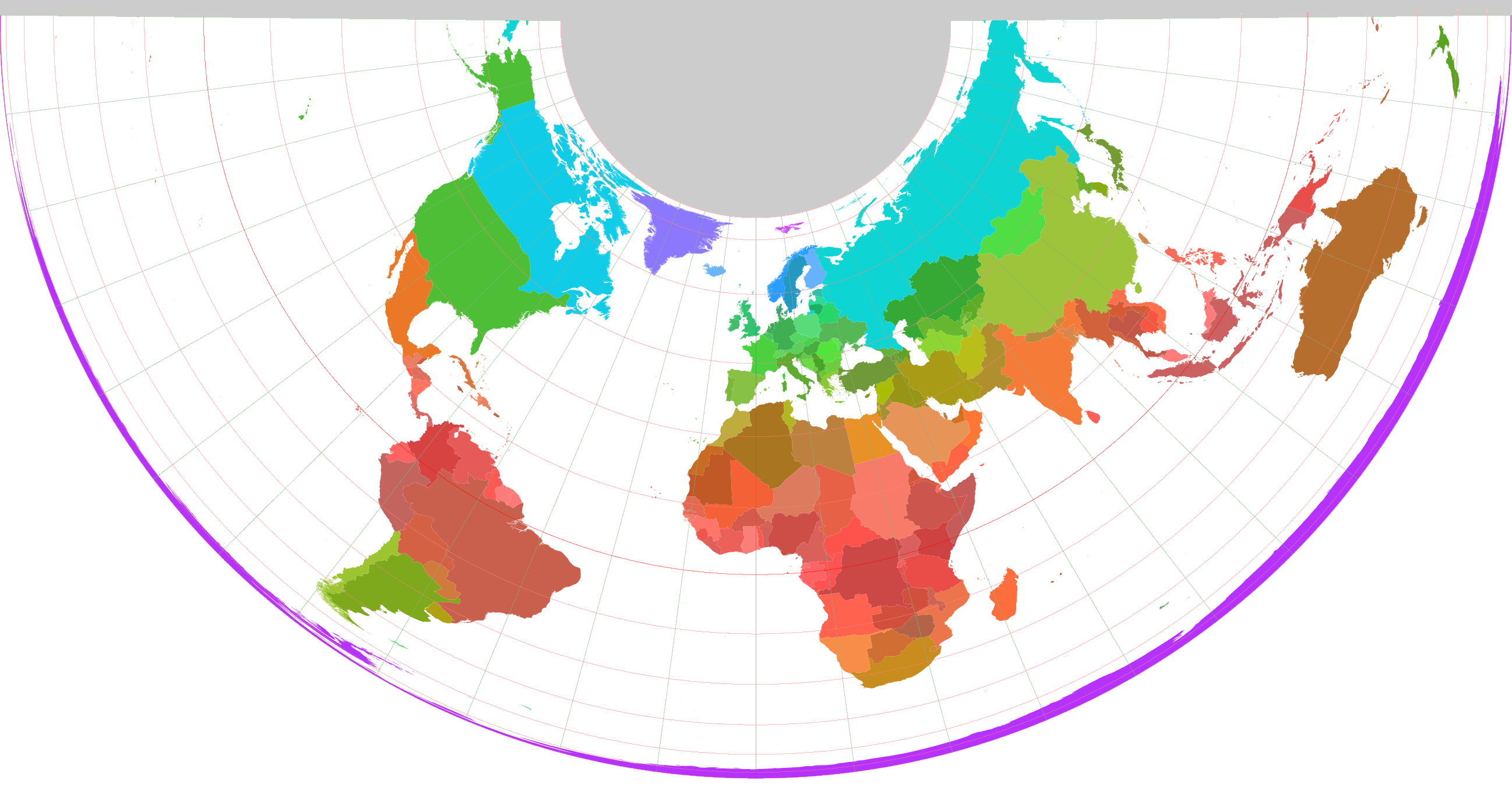 Staatkundige kaart van de Wereld op basis van een oppervlaktegetrouwe kegelprojectie (schaalvaste parallellen: 33-22,5 en 33+22,5 graden) met kleuren die variëren met de breedtegraad